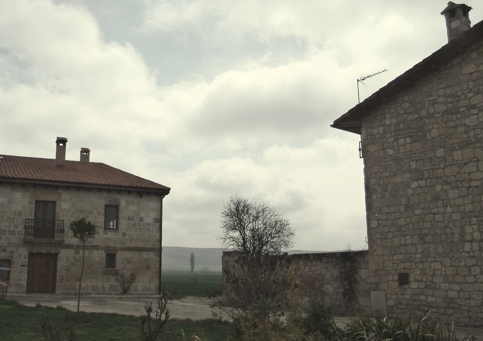 paisaje urbano, Vivar del Cid, Quintanilla-Vivar, provincia de Burgos, Castilla y León, España